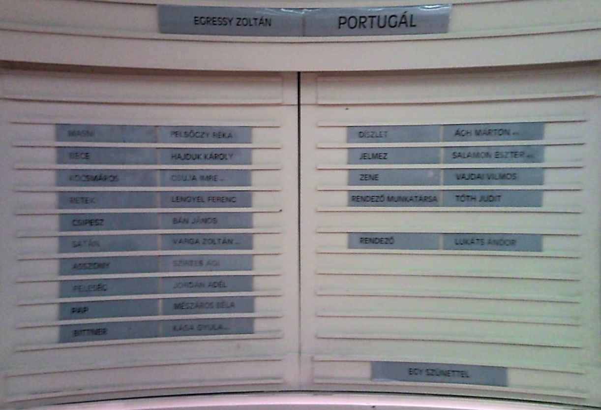 Budapesti Katona József Színház Portugál 300 előadás színlapja